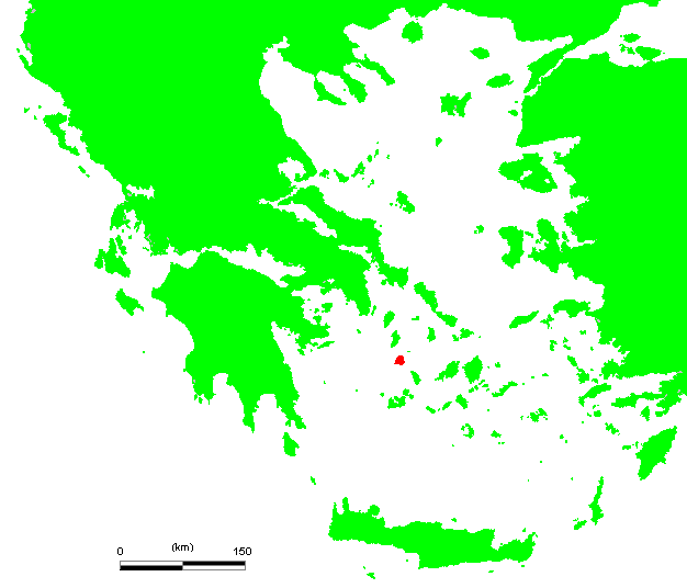 GR Serifos.PNG (Greek island)